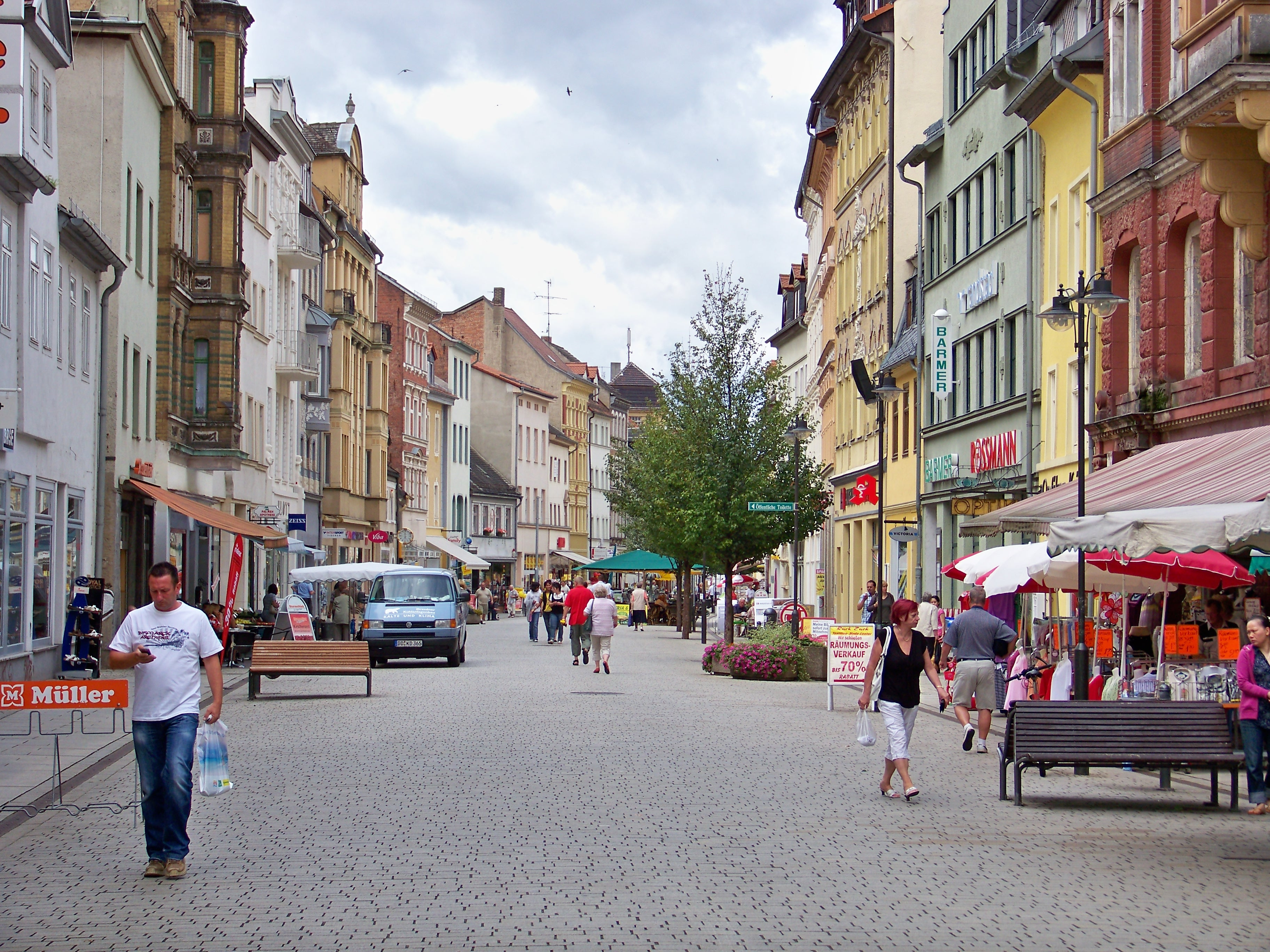 Jüdenstraße in Weißenfels